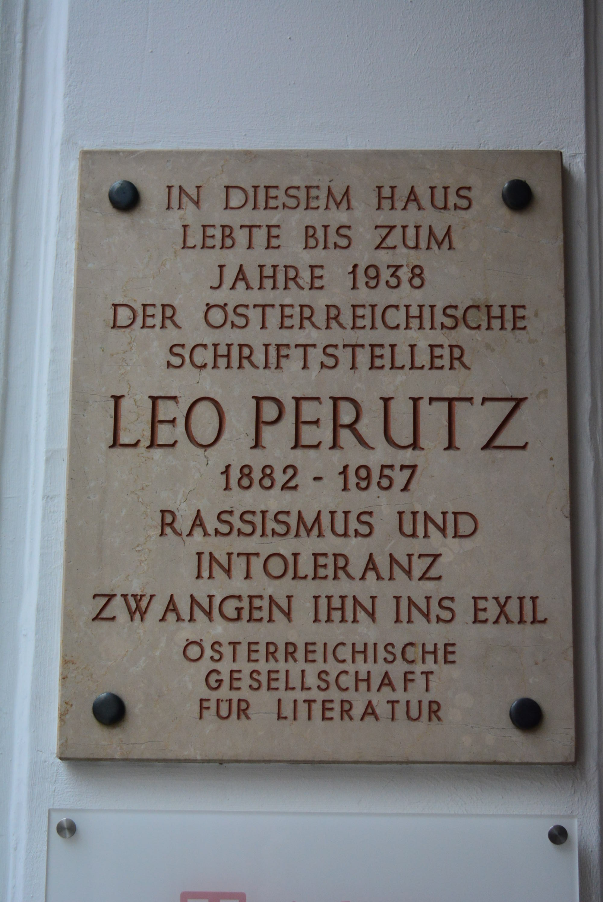 Gedenktafel für NS-Opfer (Wien, Porzellangasse 37, Leo Perutz)